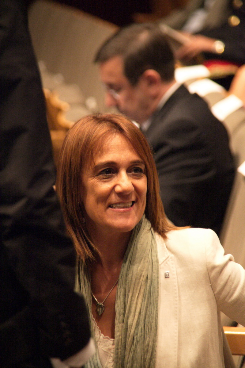 Ester Franquesa i Bonet (Badalona, 1961) és una filòloga catalana, directora general de Política Lingüística, durant el lliurament dels Premis Nacionals de Cultura de Catalunya 2014. Santa Coloma de Gramenet, 2 de juny de 2014